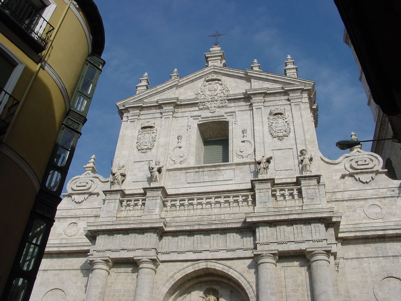 Segundo cuerpo del imafronte de la catedral de Valladolid (España), con trazas de Alberto de Churriguera. Pueden verse las estatuas en piedra de los cuatro doctores de la Iglesia latina: San Agustín y San Ambrosio (obra de Pedro Baamonde) más San Gregorio y San Jerónimo (obra de Antonio de Gautúa). Pueden verse también dos escudos con los temas marianos del sol y la luna, obra del escultor salmantino Juan García Espinosa. En el centro se abre una ventana rectangular y sobre ella una cornisa que la separa del tercer cuerpo.